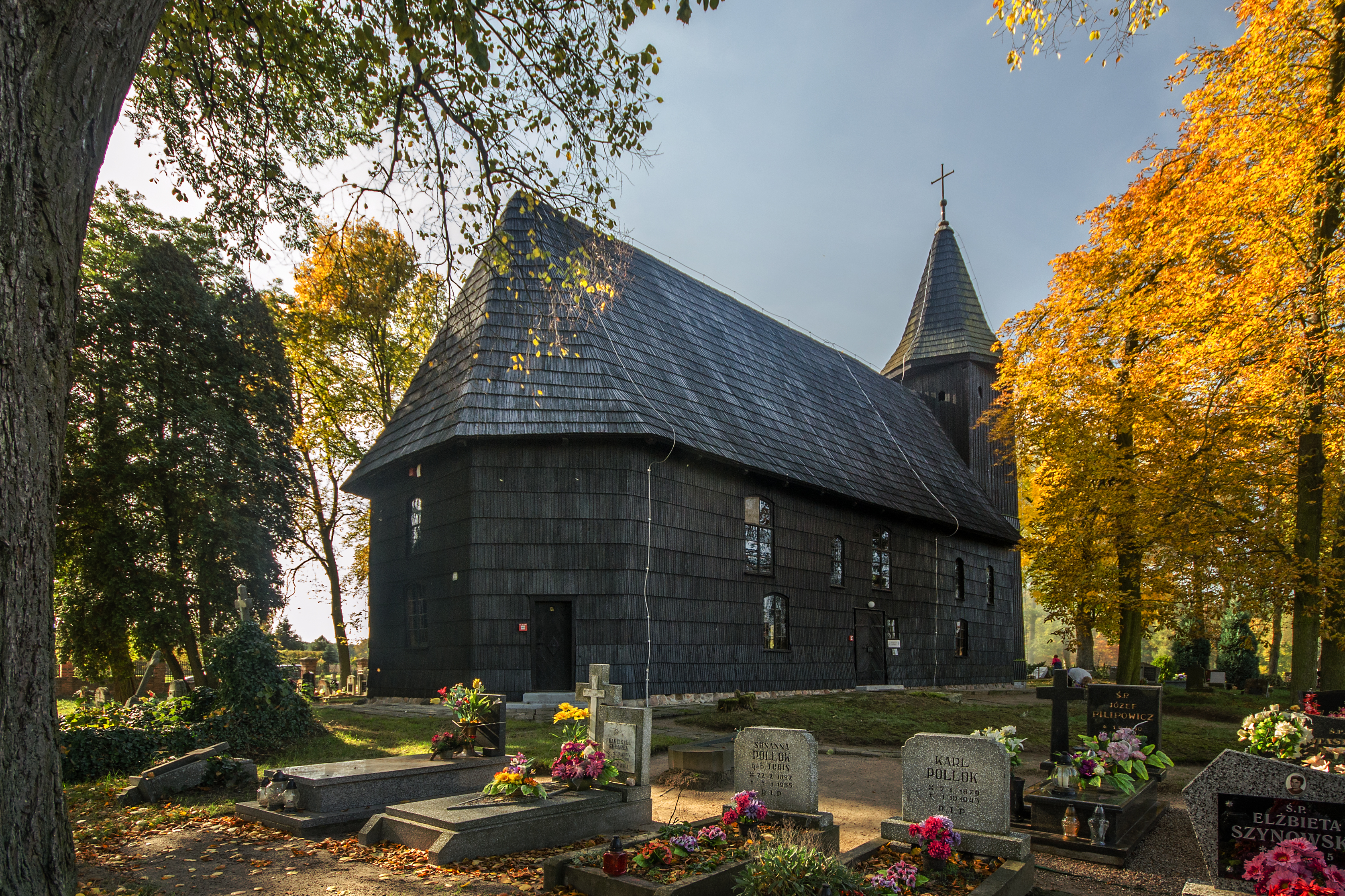 Gierałcice, kościół ewangelicki, XVII